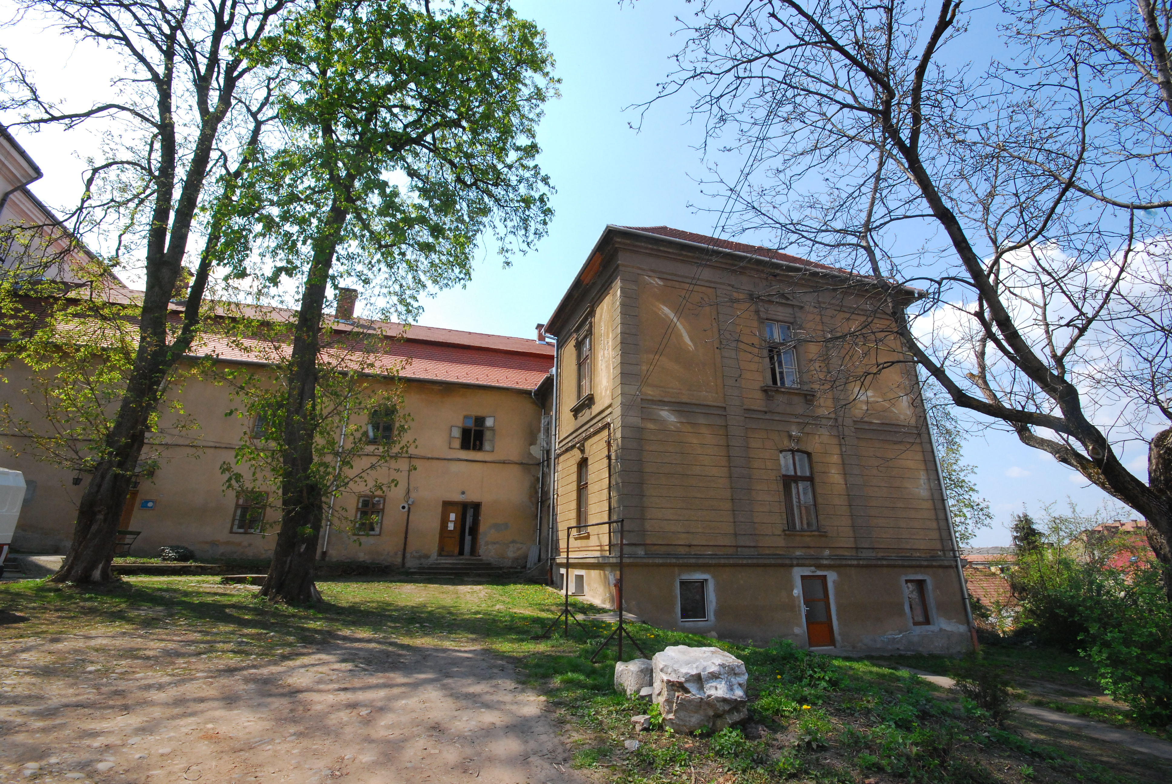 Claustrul și anexele 02